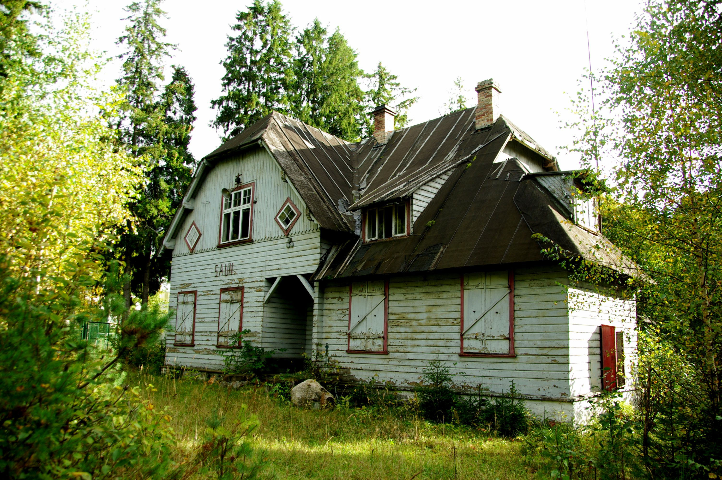 Harju maakond, Tallinna linn, Haabersti linnaosa